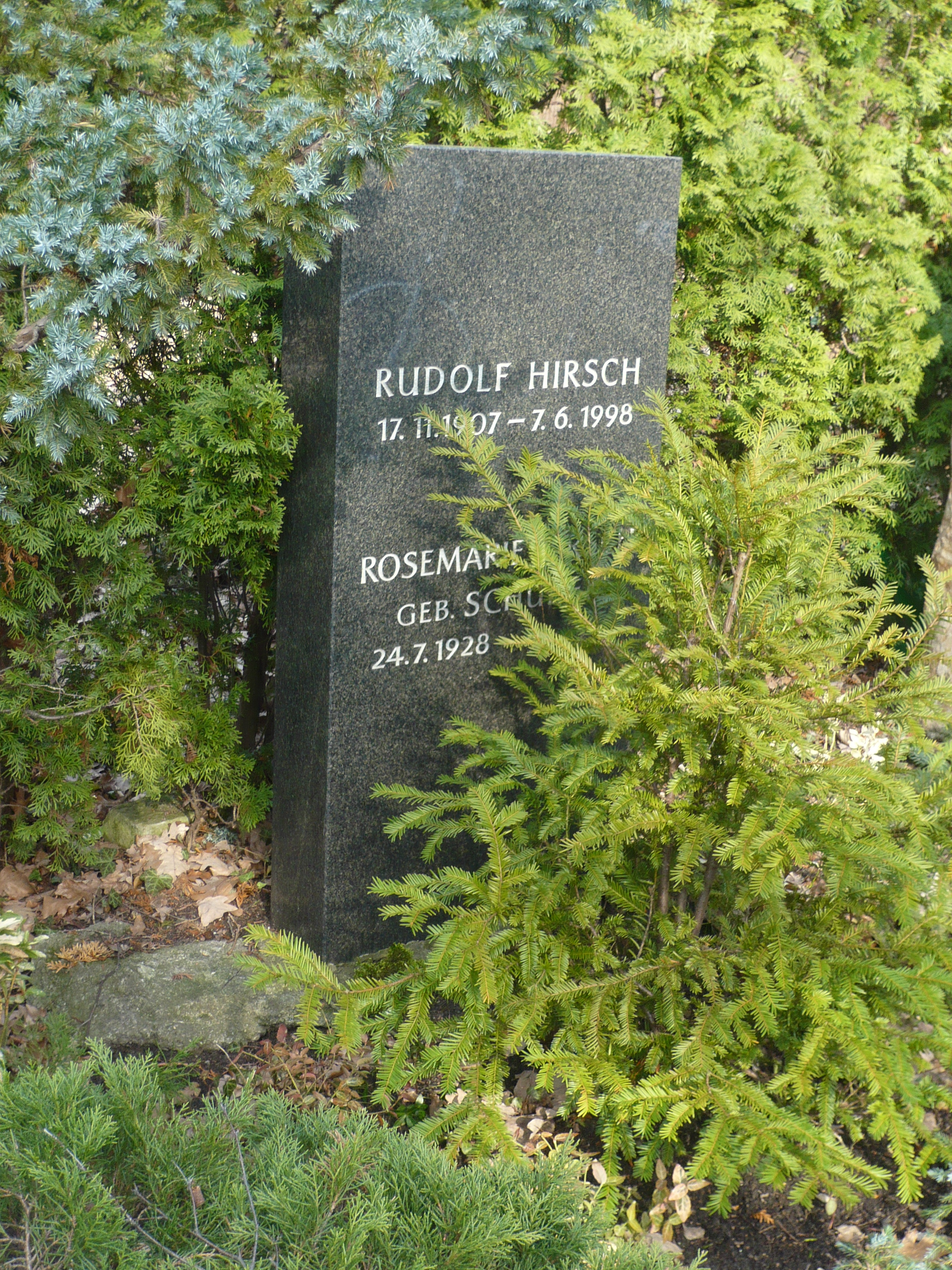 Grab auf dem Zentralfriedhof Friedrichsfelde, Journalist Rudolf Hirsch